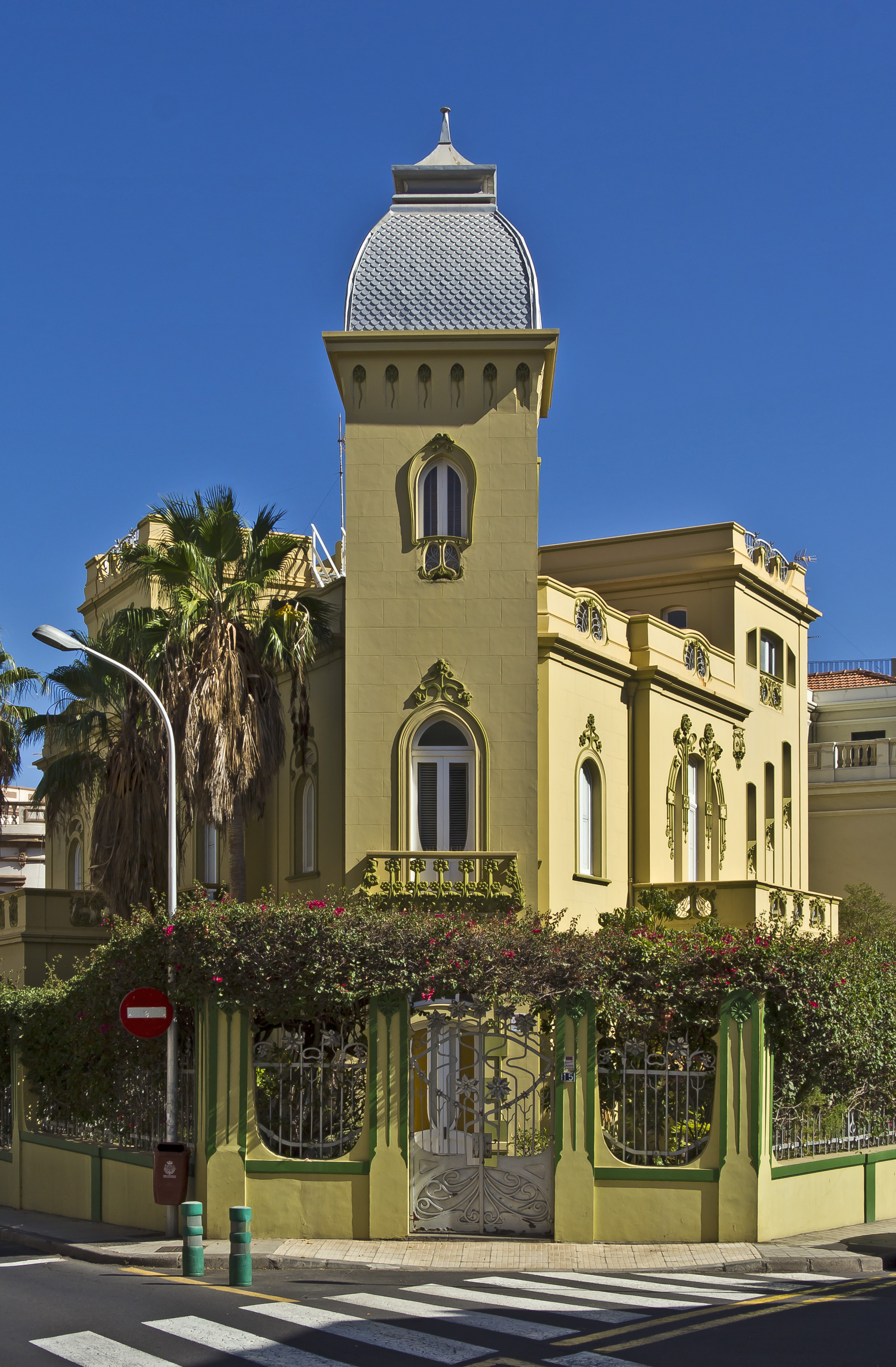 Casa Quintero in der Calle Viera y Clavijo in Santa Cruz de Tenerife wurde im Jahr 1905 gebaut. Der Architekt war Mariano Estanga y Arias Girón.